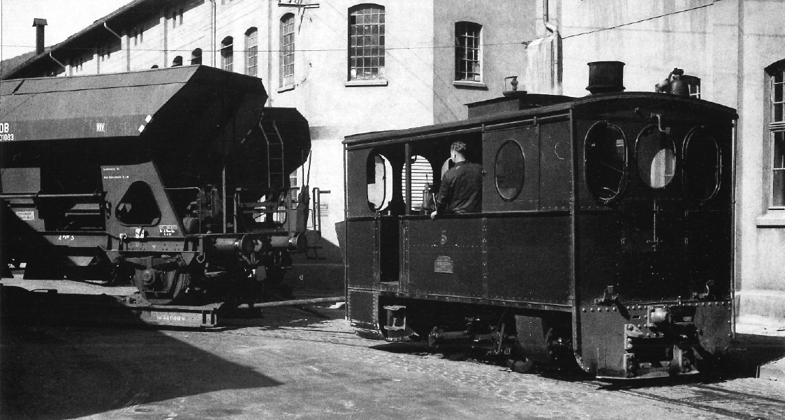 Plettenberger Kleinbahn Nr. 5II auf einer Aufnahme von 1950